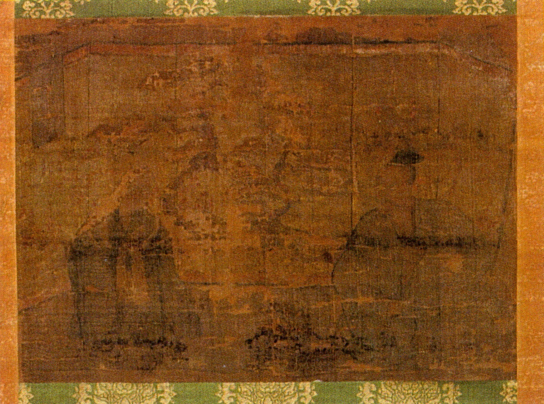 宗貞国の肖像。